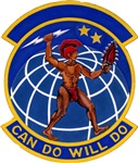 292 Combat Communications Squadron emblem